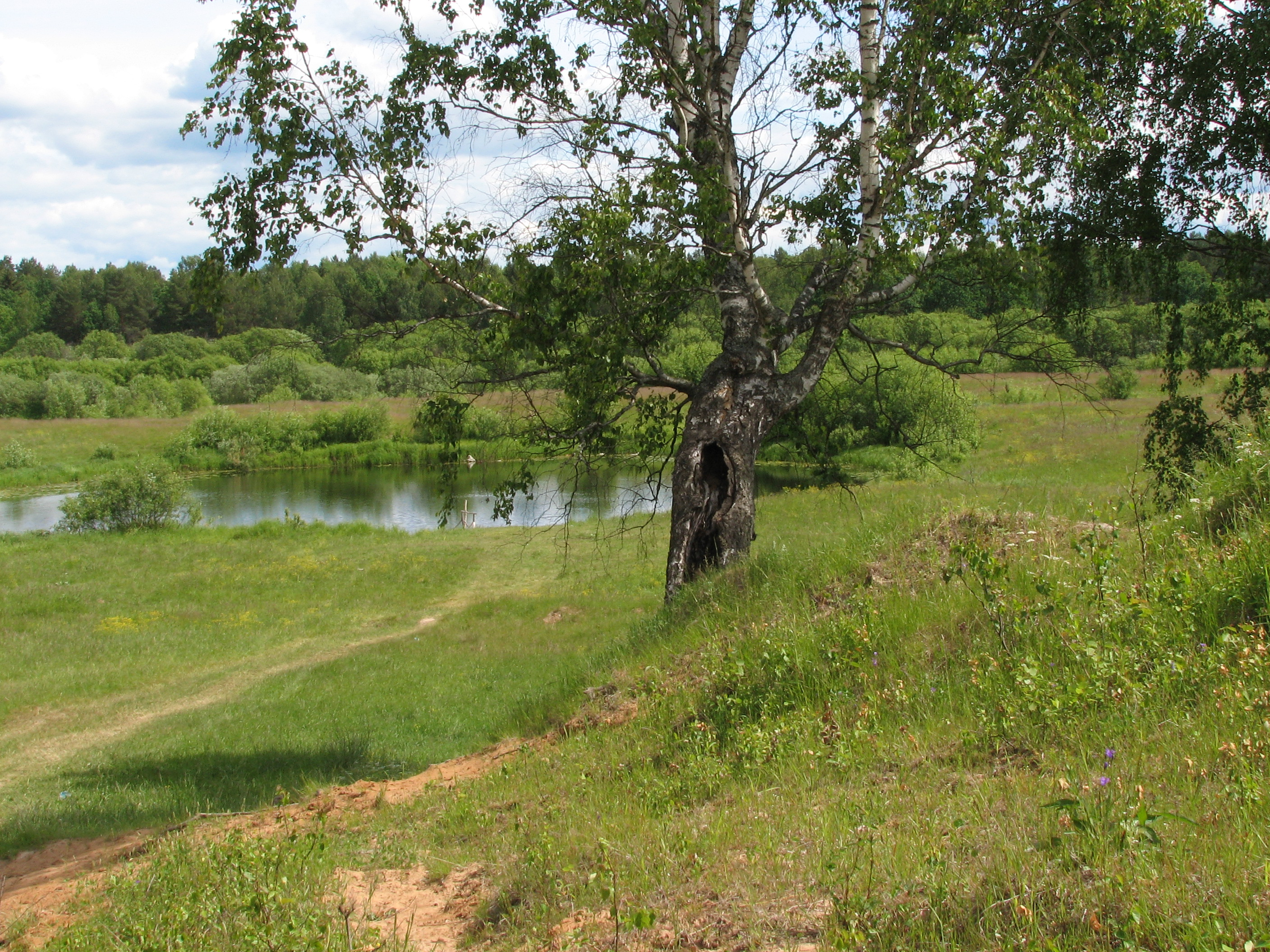 Долина р. Уста у с. Драничное